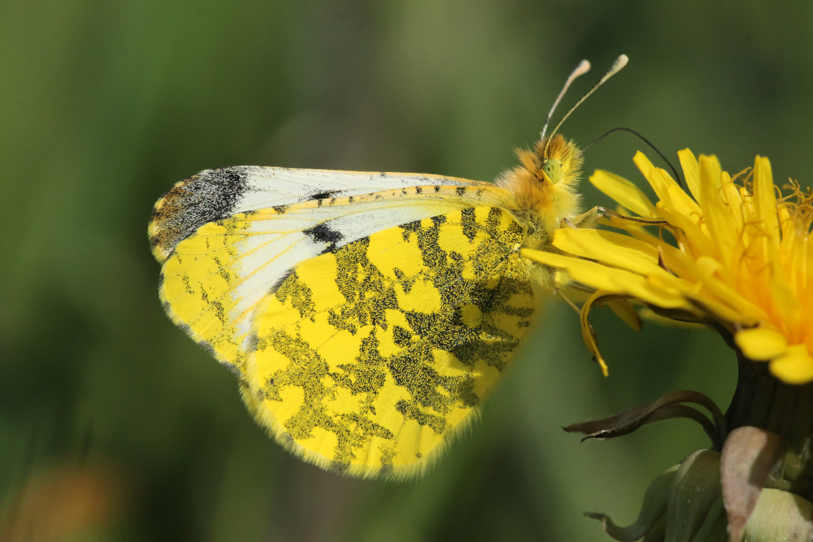 Östlicher Aurorafalter (Antchocharis damone) Weibchen Unterseite